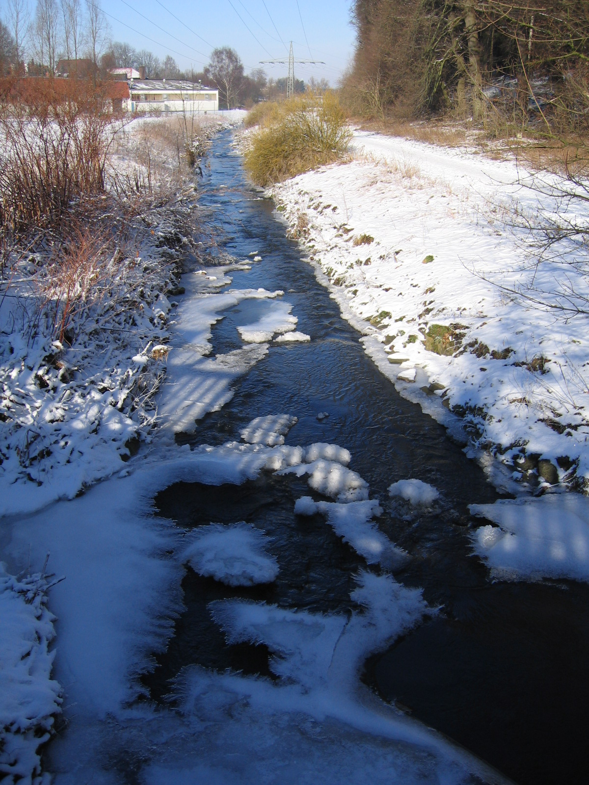 Description: Der Baarbach bei Iserlohn-Barendorf. Source: selbst fotografiert Date: 29. Jan. 2006 Author: Bubo